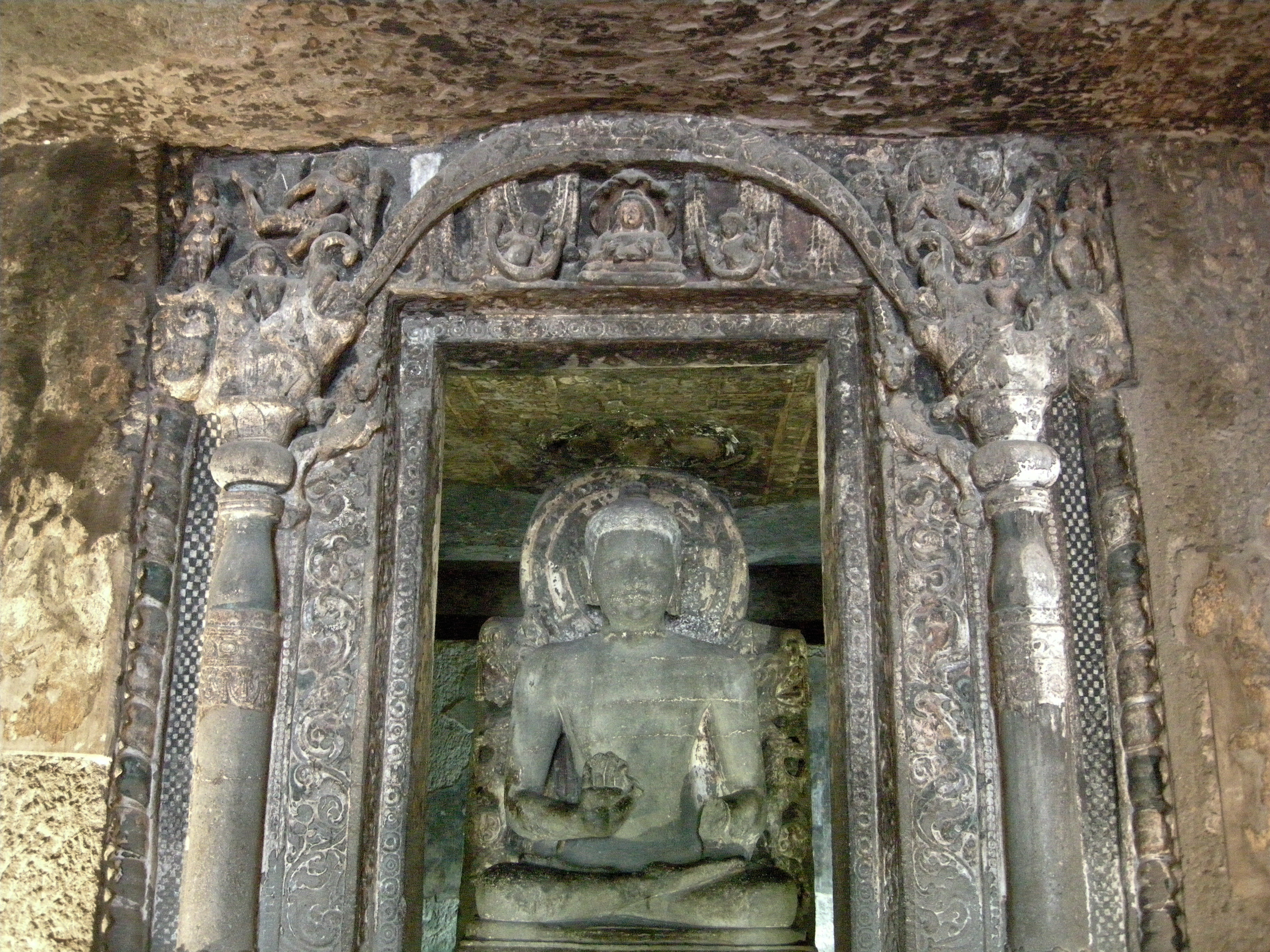 Es zeigt einen Buddhaschrein im unteren Geschoß aus der Höhle 6 in Ajanta.